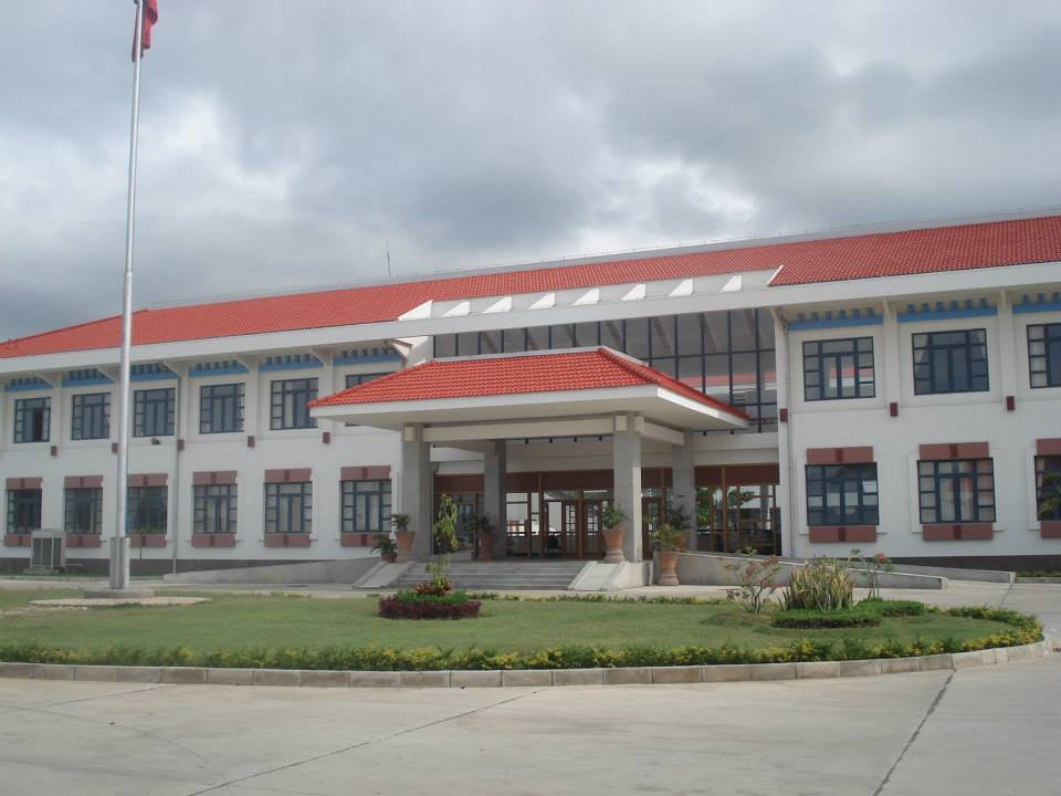 Dili